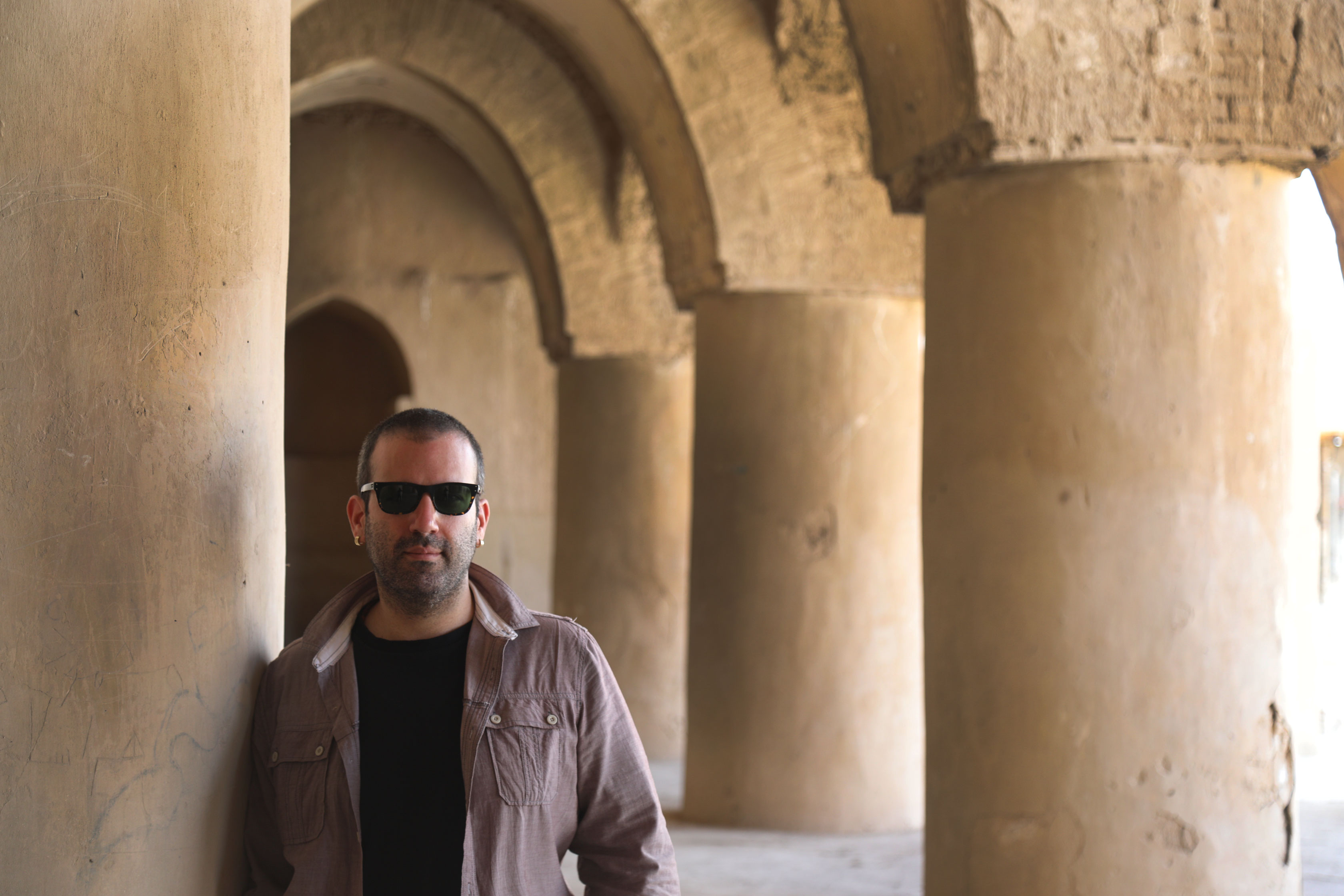 نگاره علی اتحاد